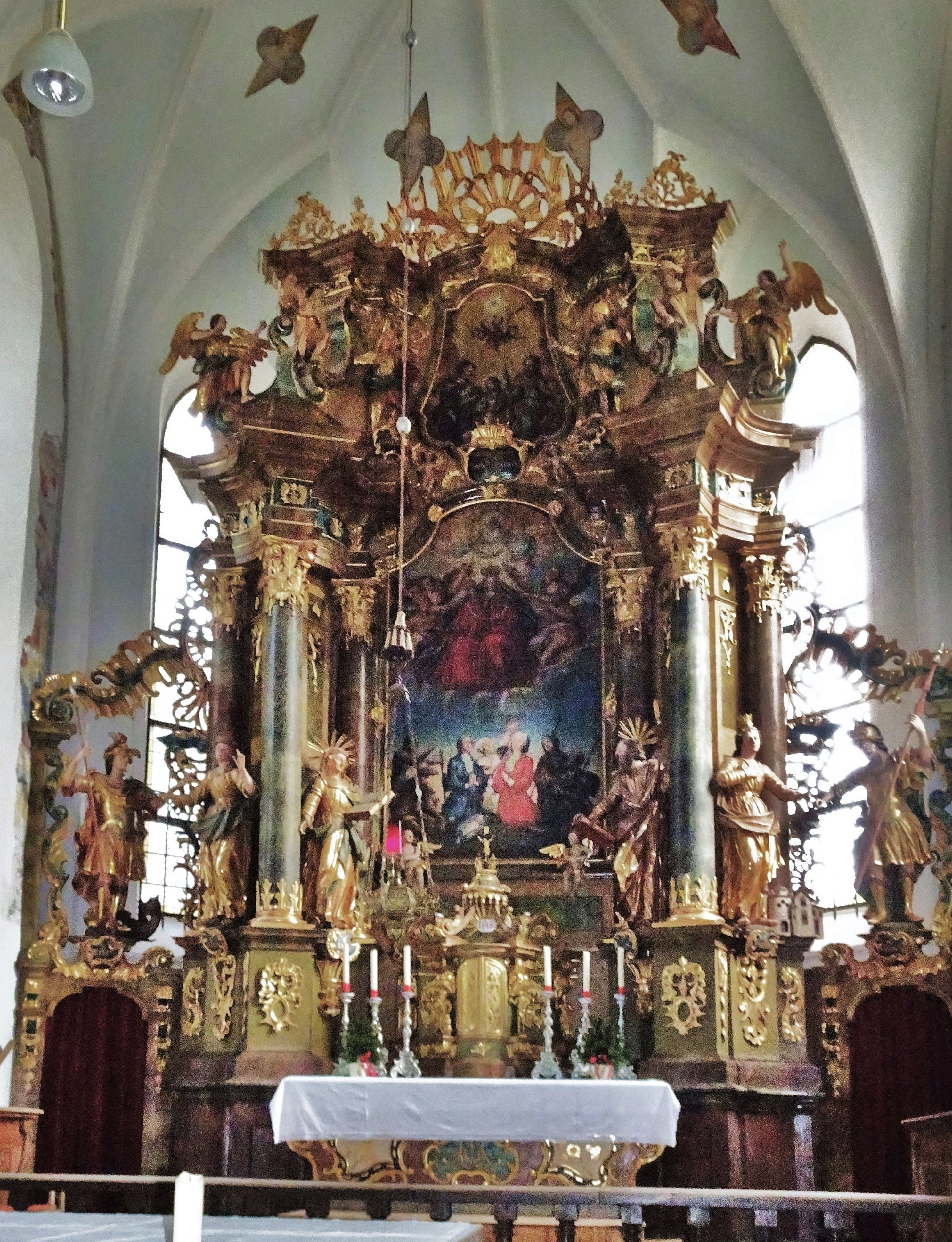 Kath. Filialkirche Maria Tax (Stallhofen), der Hochaltar